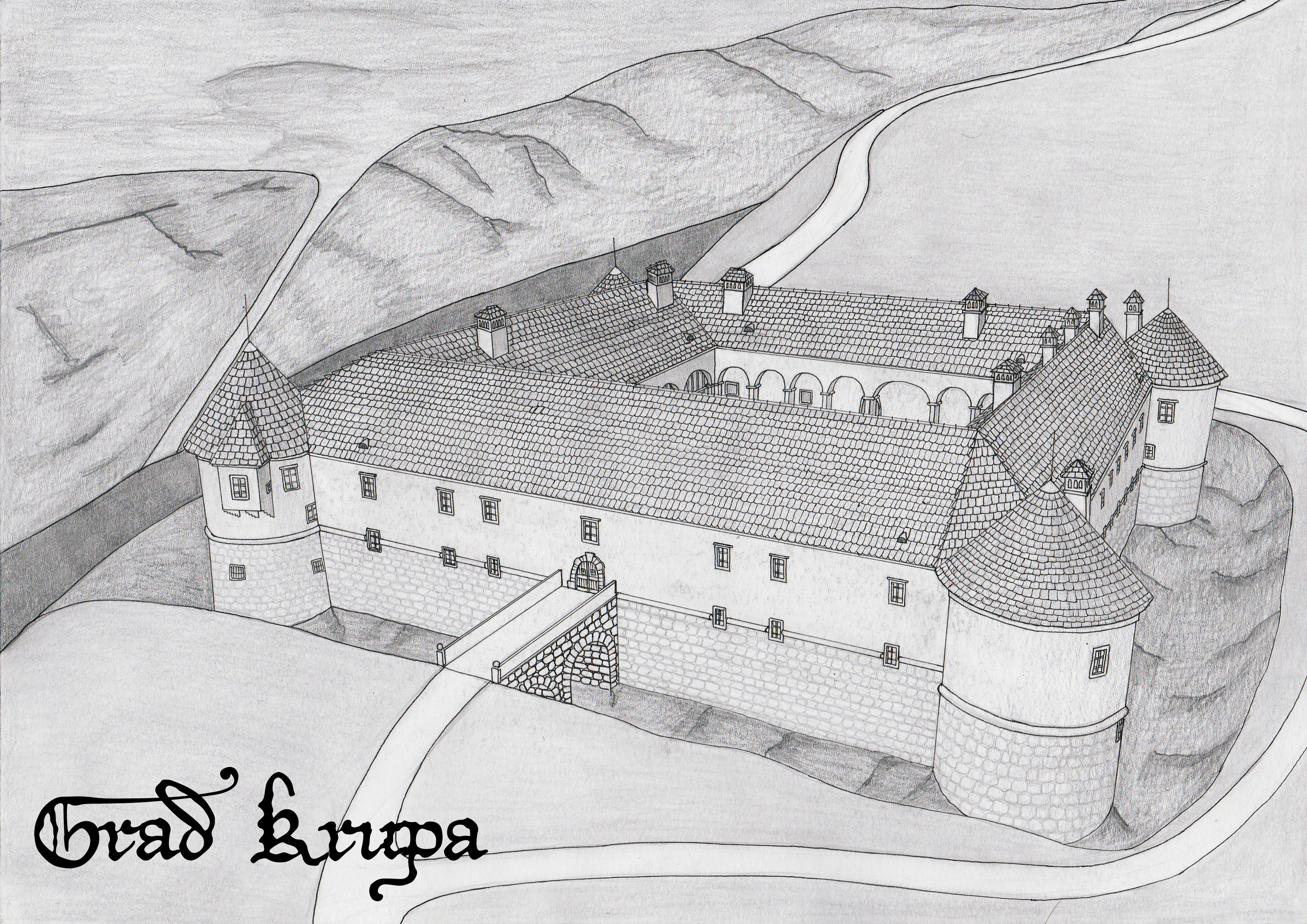 Poskus rekonstrukcije gradu Krupa pred popolnim uničenjem med drugo vojno.